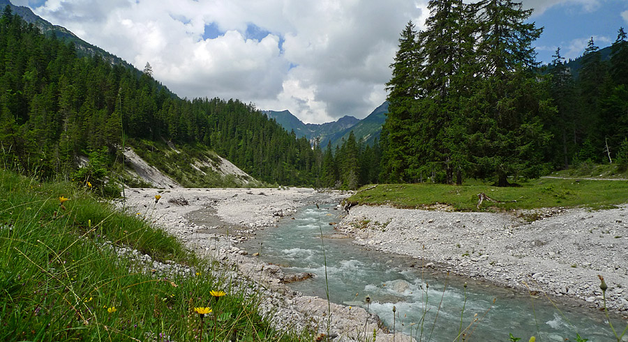 Schwarzwassertal